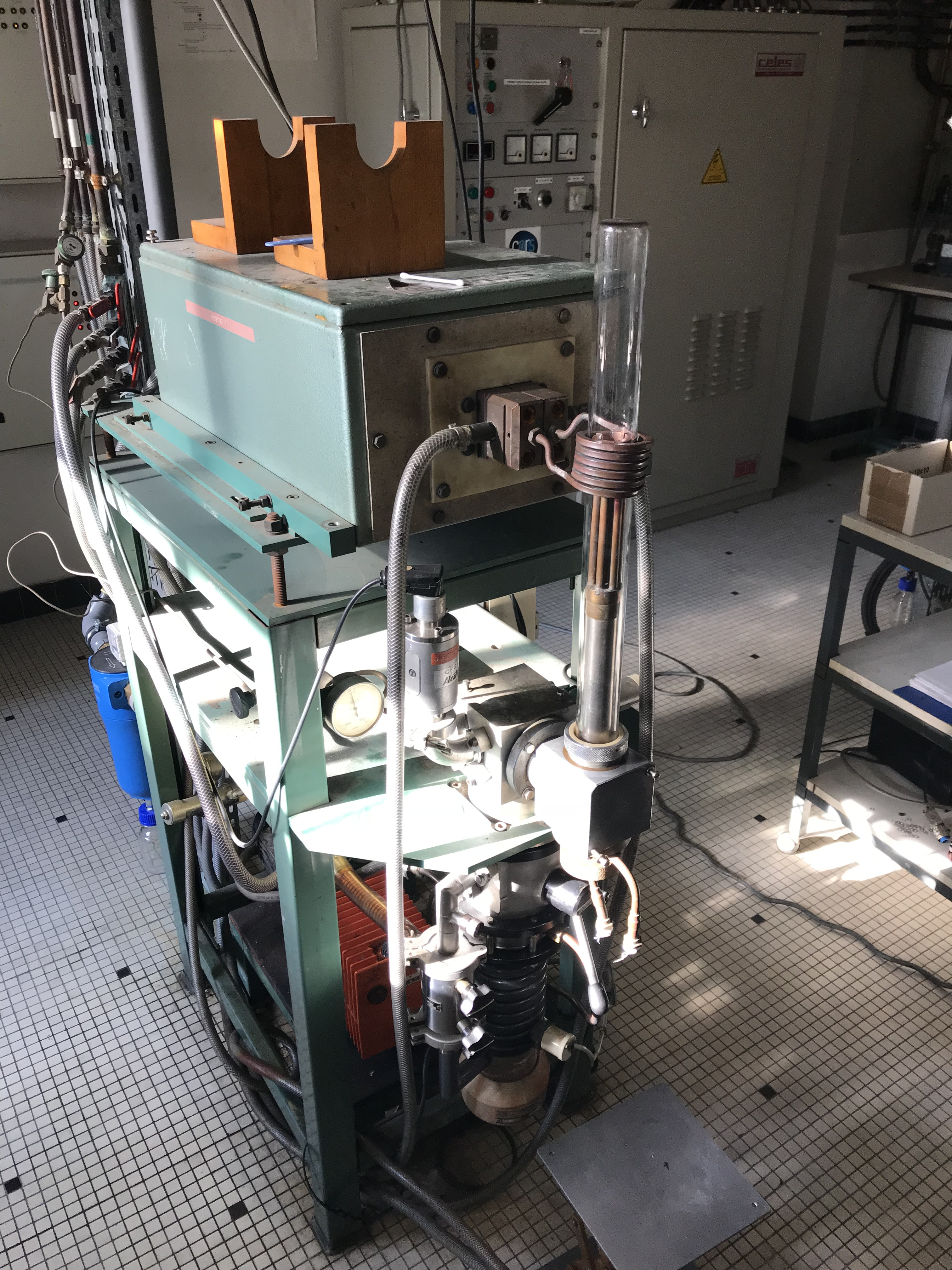 Matériel de synthèse